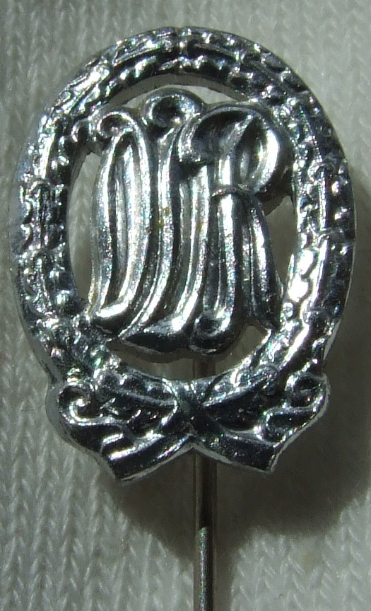 Sportabzeichen der DDR (hochoval)